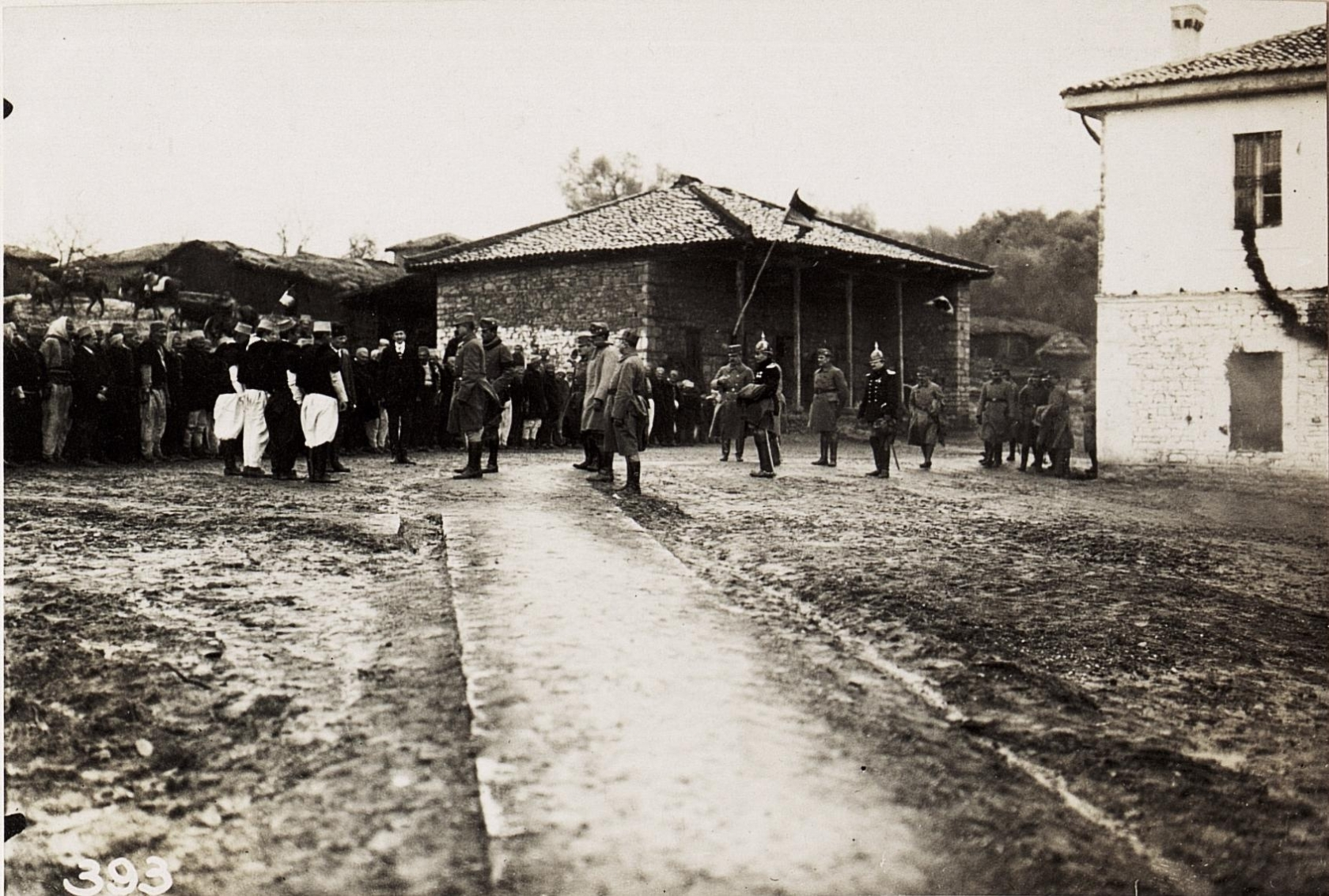 Ansprache an die Deputation in Rogosina.